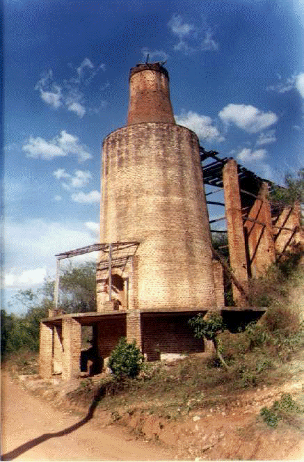 Limekiln or quicklime kiln (calcium oxide), Farias Brito City, Ceará, Brazil.